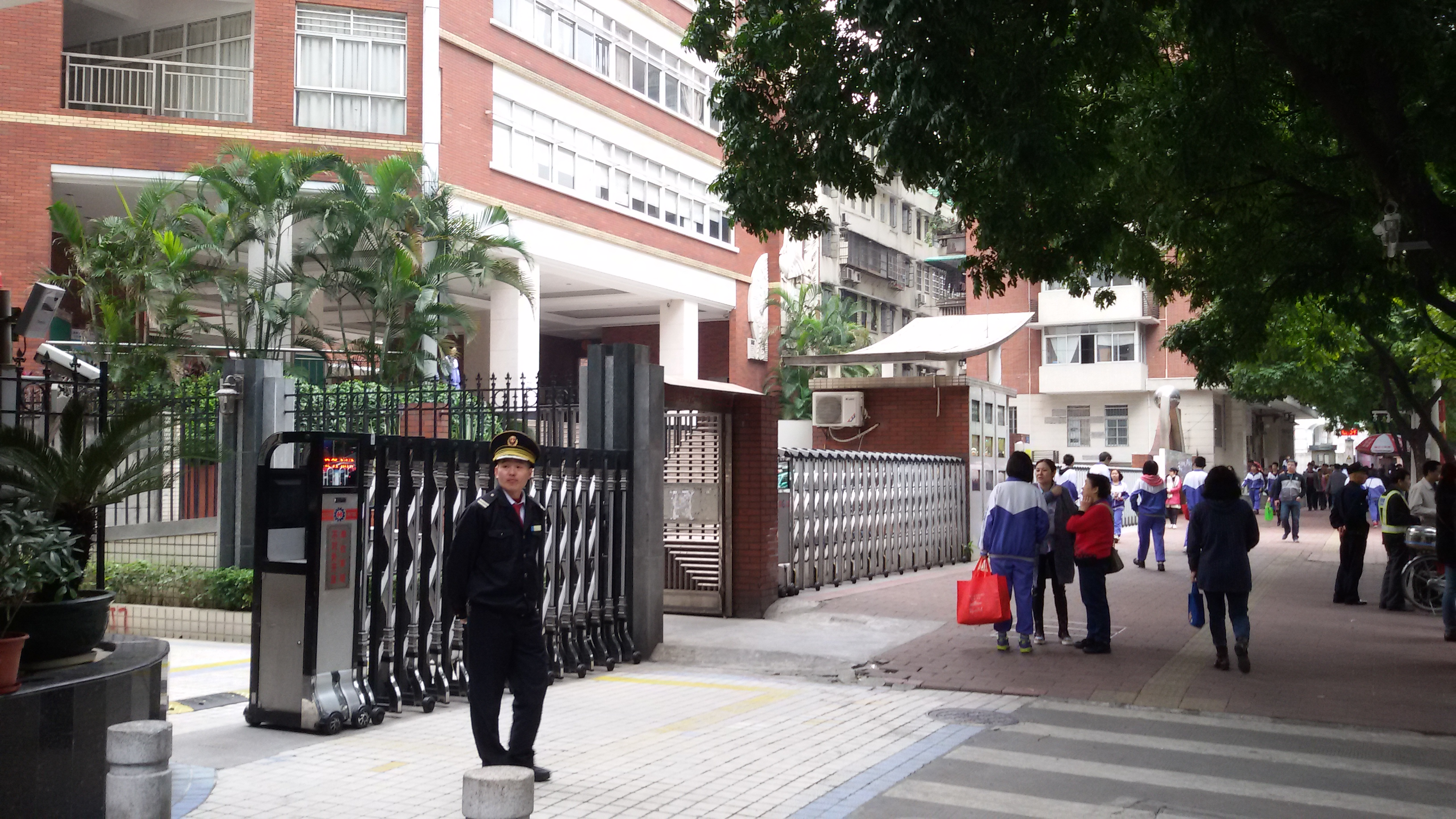 粵語: 广州市第十六中学嘅正门